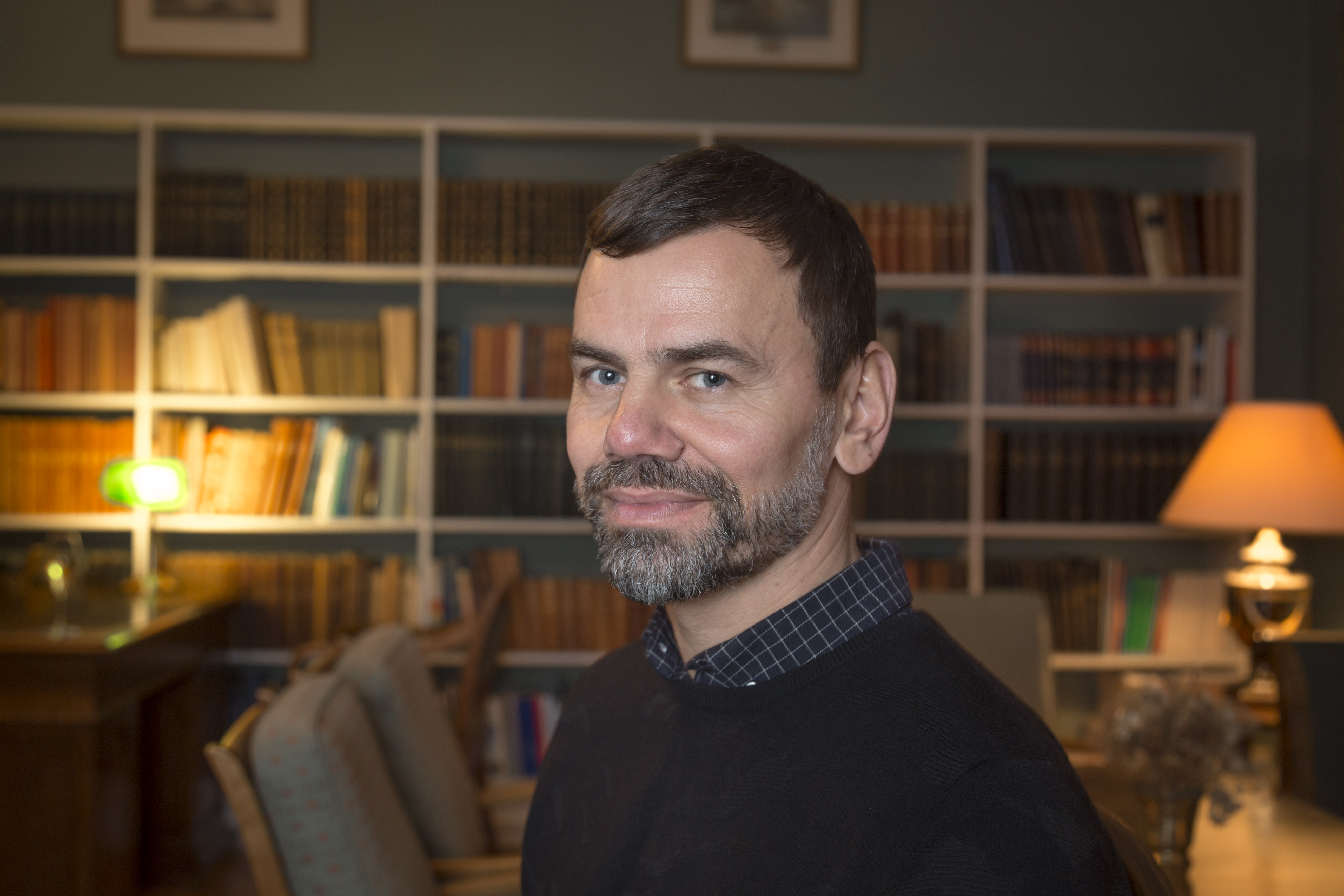 Ingar Dragset